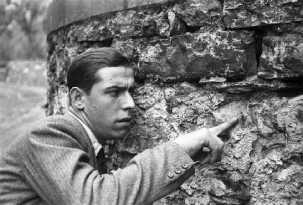 Ricostruzione dell'uccisione di Benito Mussolini: Urbano Lazzaro "Bill" indica un foro di proiettile nel muretto di Villa Belmonte, a Giulino di Tremezzina (ora Mezzegra), dove avvenne la fucilazione